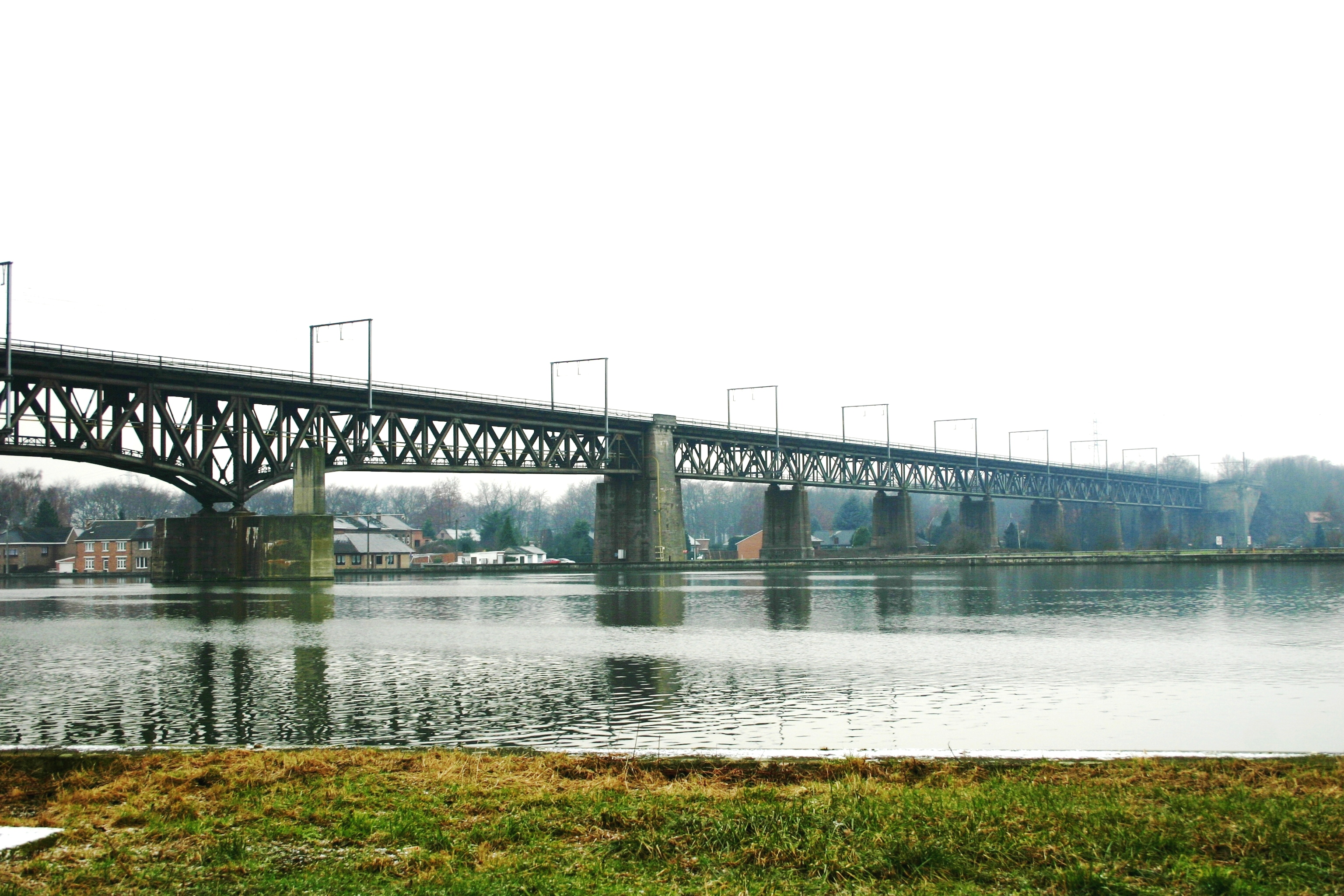 Däitsch Bréck zu Visé